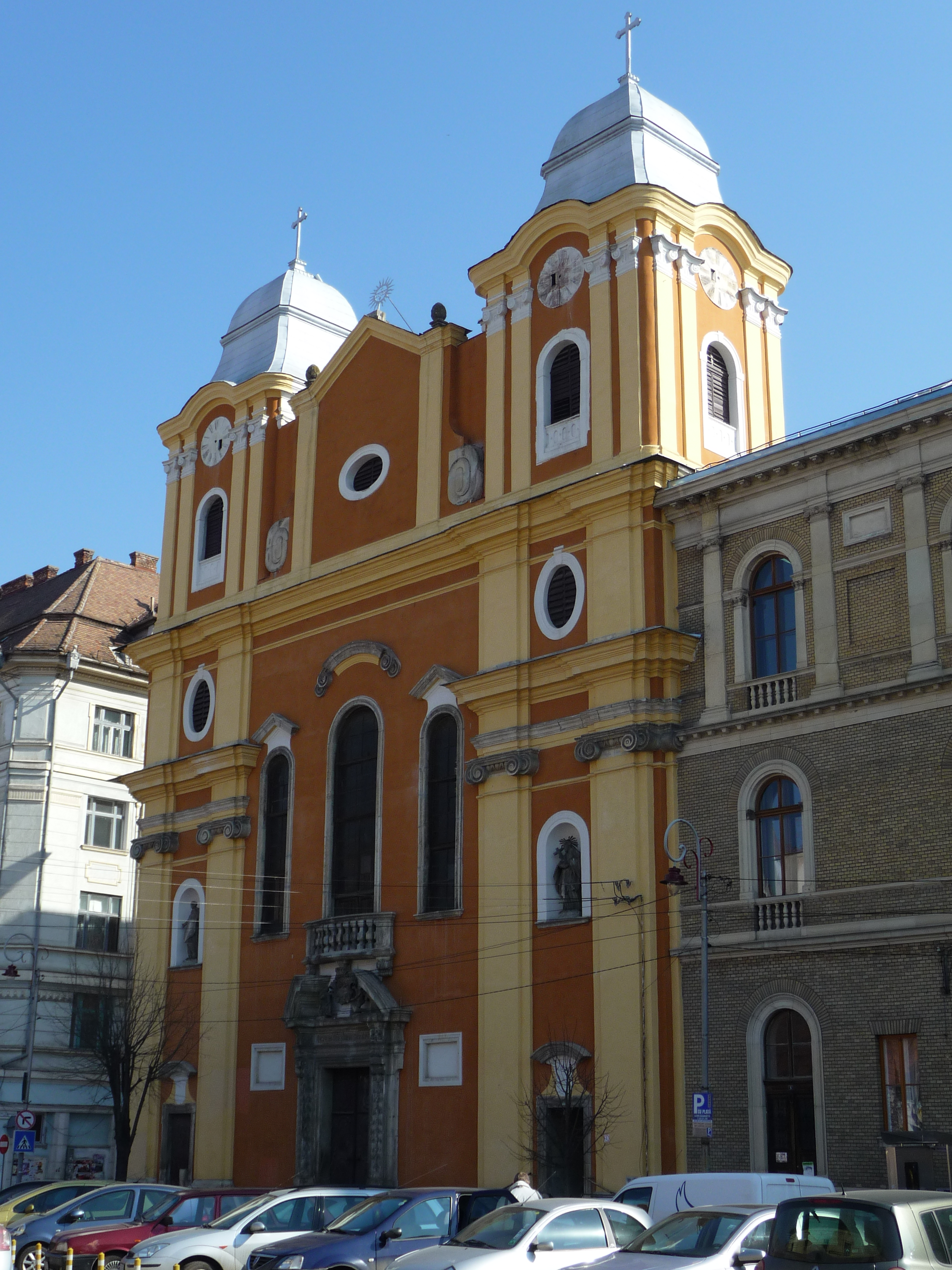 A piarista templom, Kolozsvár